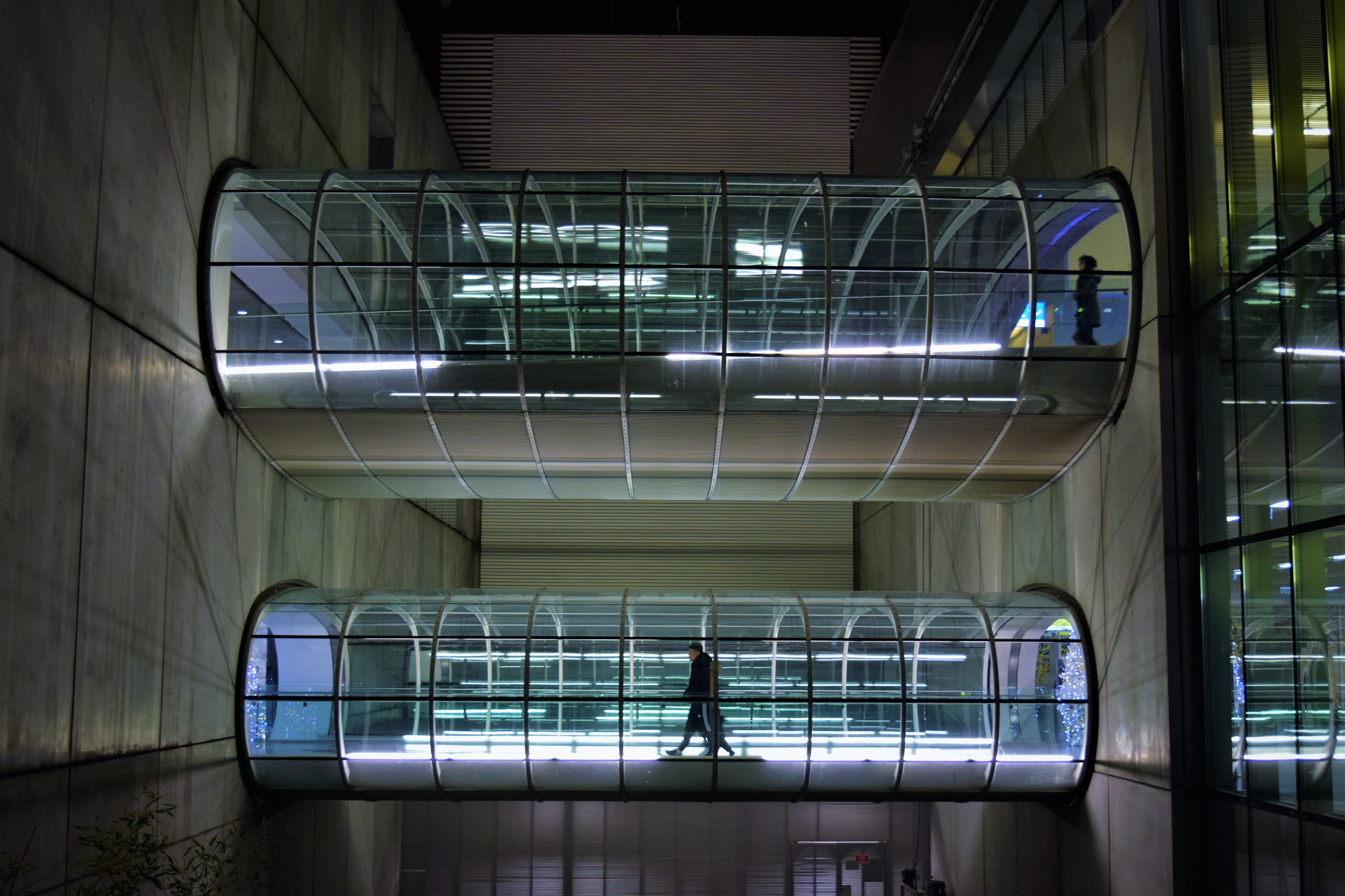 Fotografía nocturna en una de las pasarelas del aeropuerto de Toulouse-Blagnac.